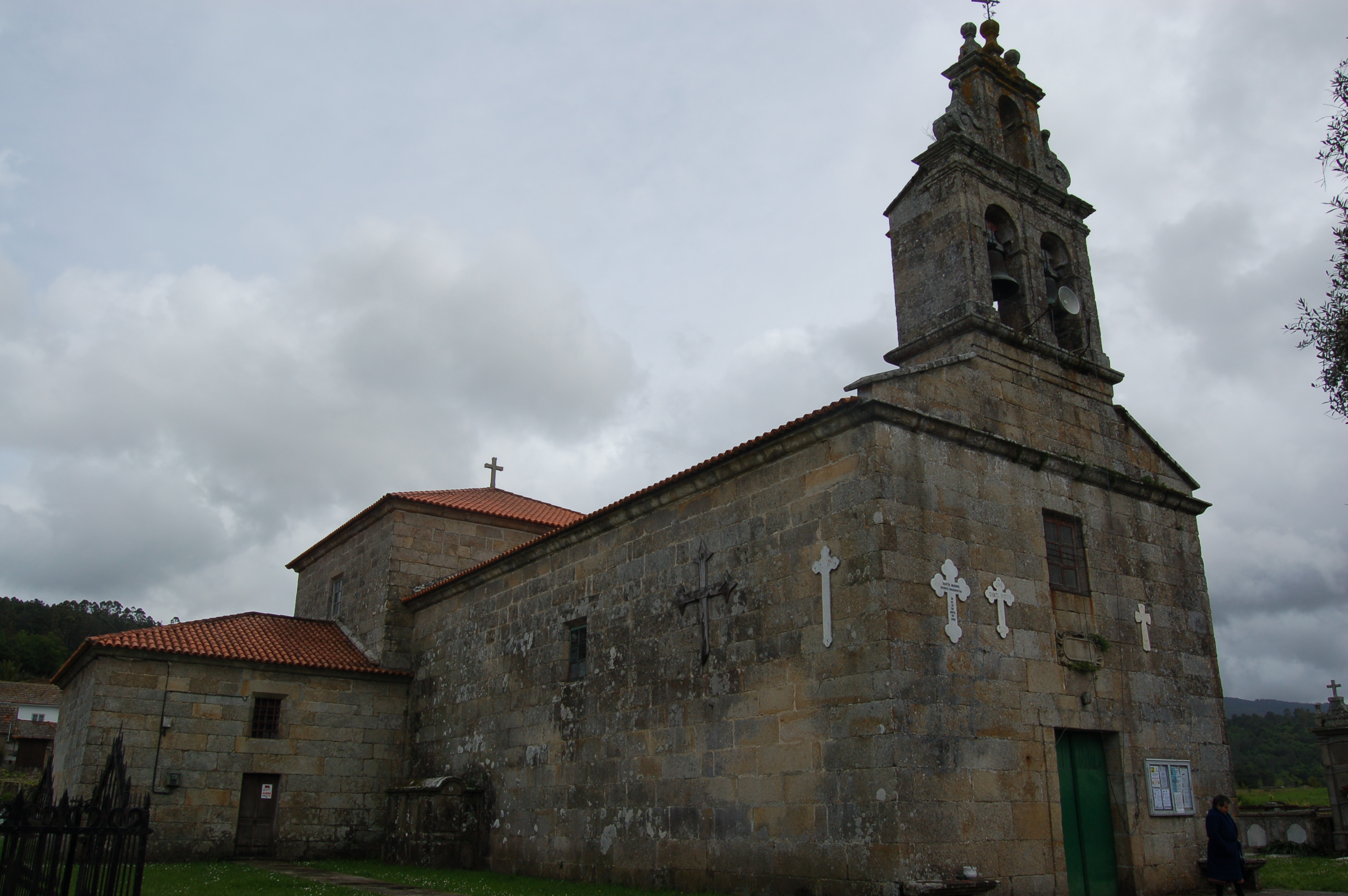 Igrexa parroquial de San Cristovo de Briallos (Portas)